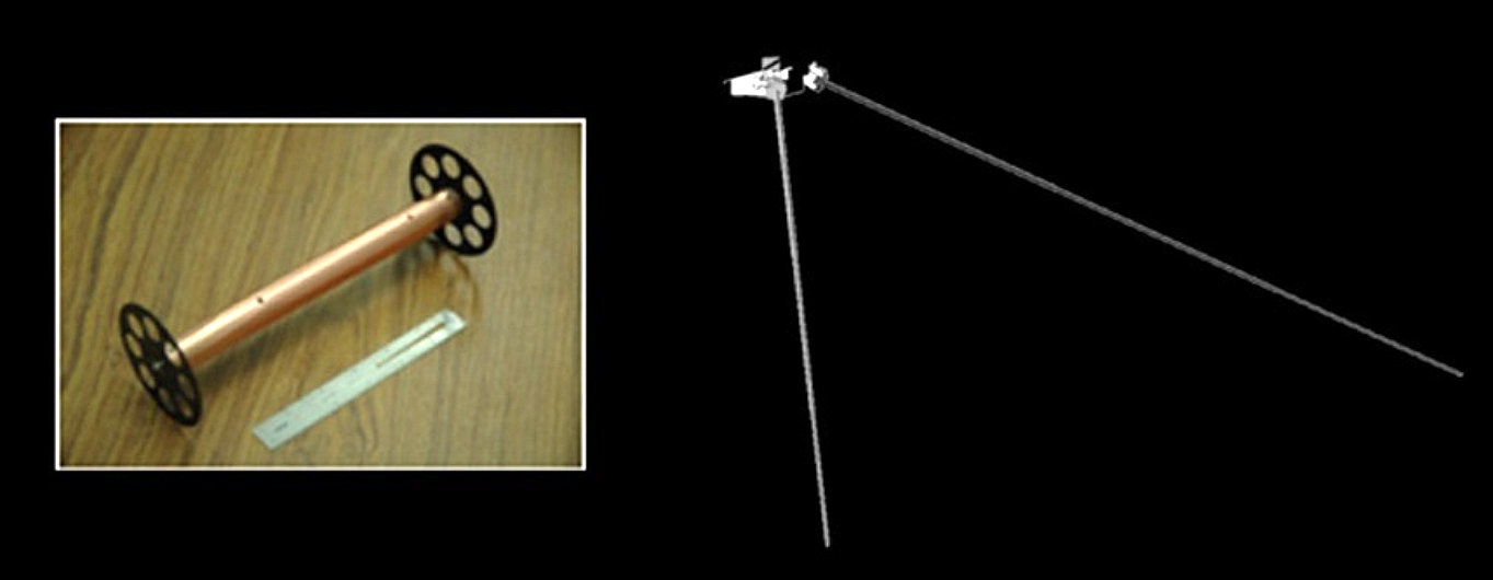 Instrument de mesure des ondes radio et magnétiques WAVES de la sonde spatiale JUNO de la NASA